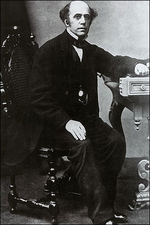 Thomas Cook (1808-1892) founded the modern tourist industry صورة لتوماس كوك مؤسس شركة توماس كوك للسفريات